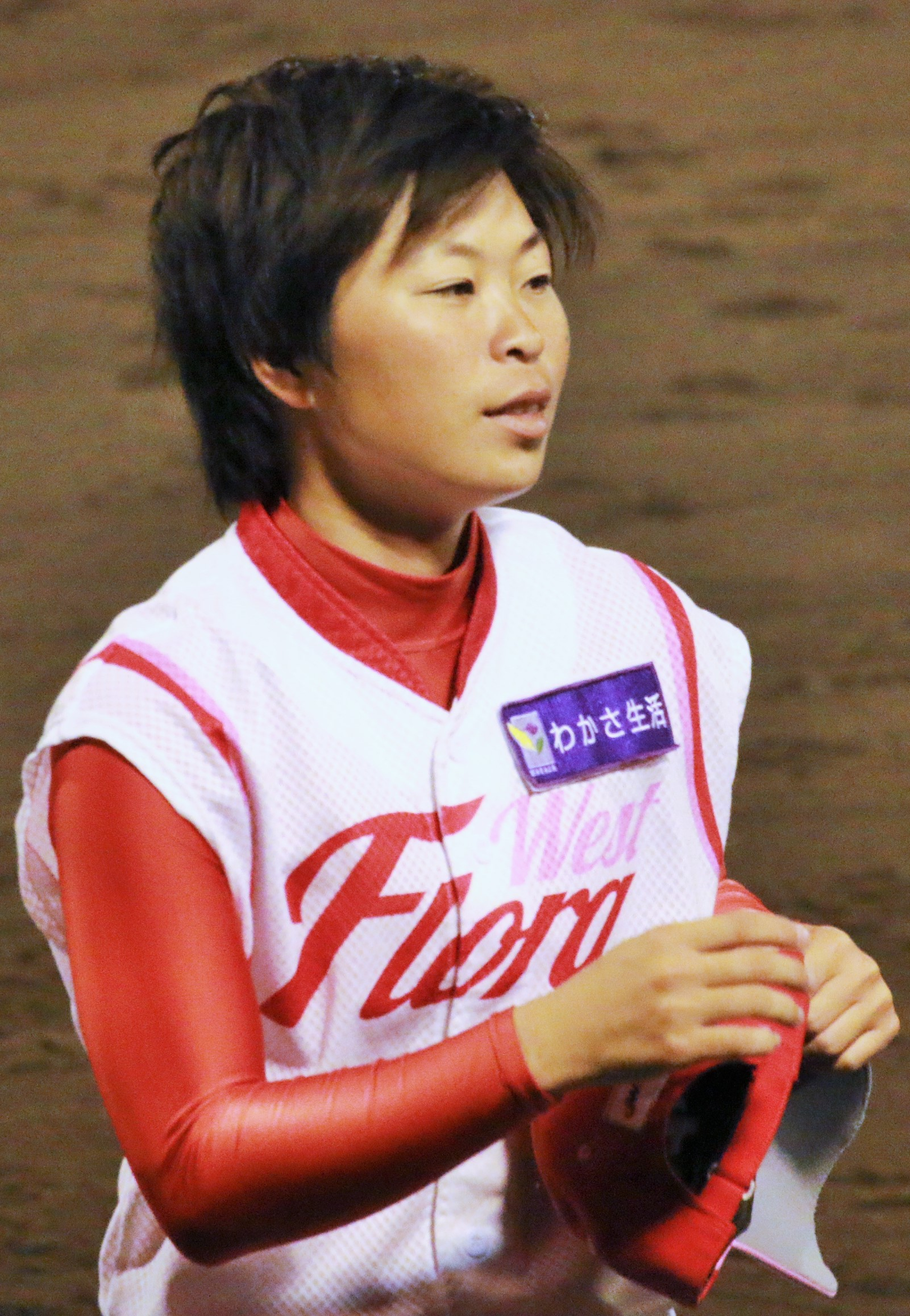 ウエストフローラコーチ新原千恵